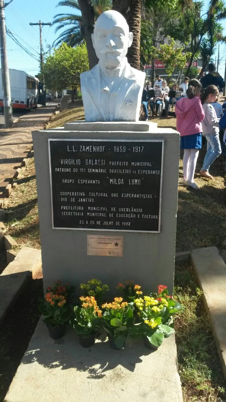 Nove skulptita busto de L. L. Zamenhof en Uberlândia, Brazilo, reinaŭgurita la 30an de junio 2017.